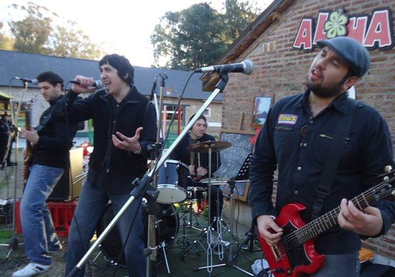 No Funk en vivo en 2013